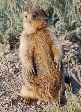 Детеныш байбака.